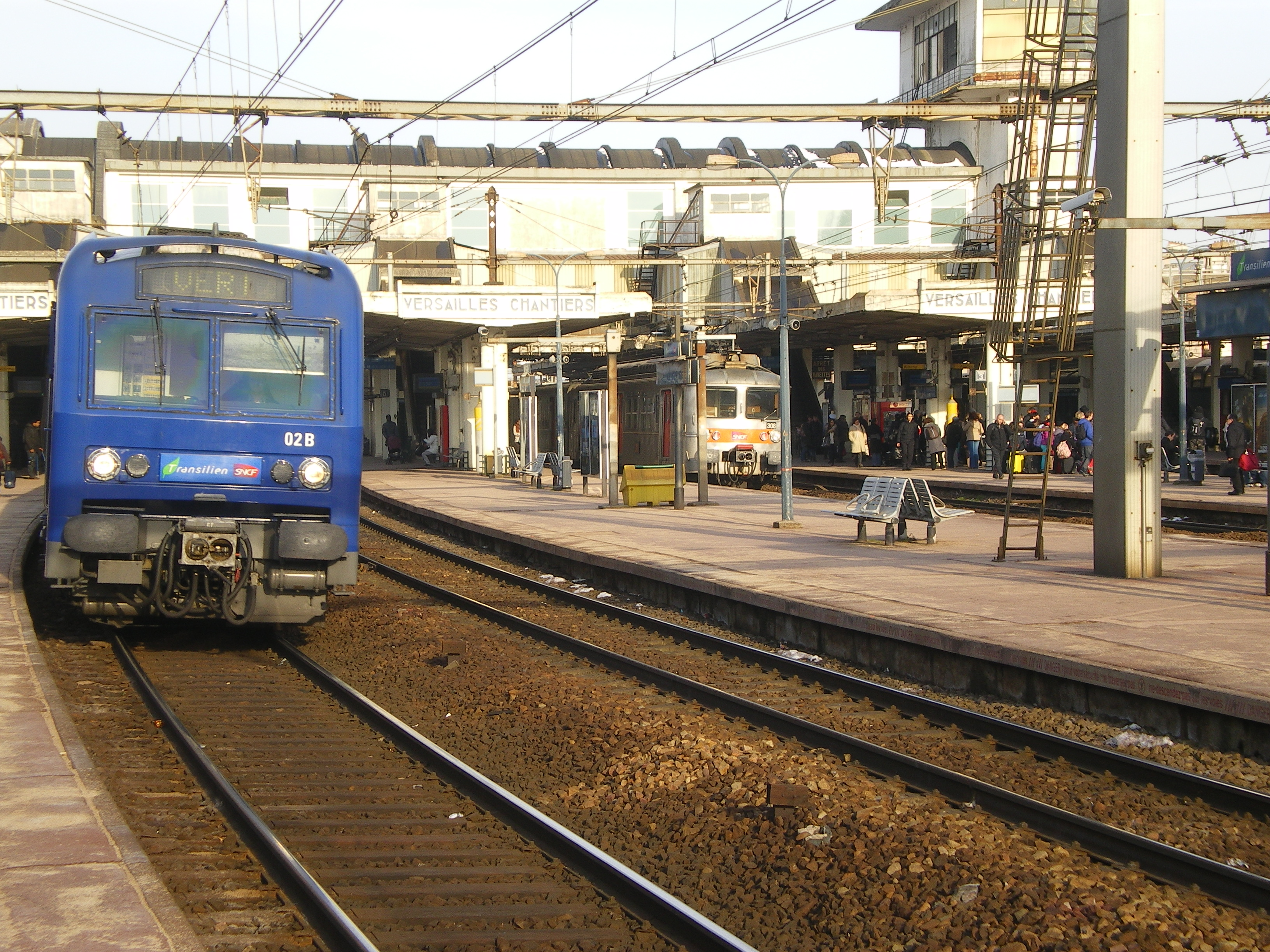 Gare de Versailles Chantiers - Mars 2013